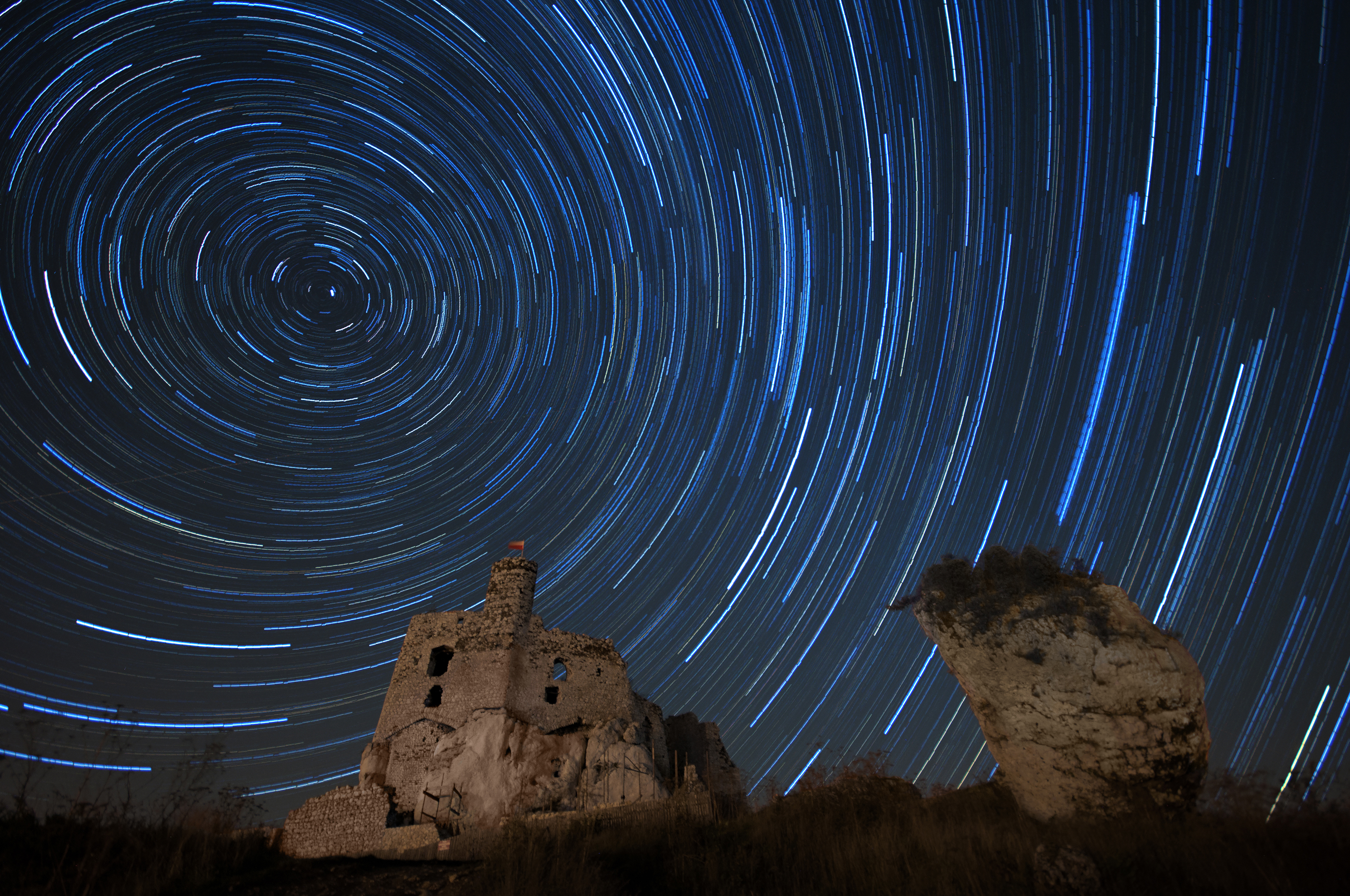 Mirów, ruiny zamku